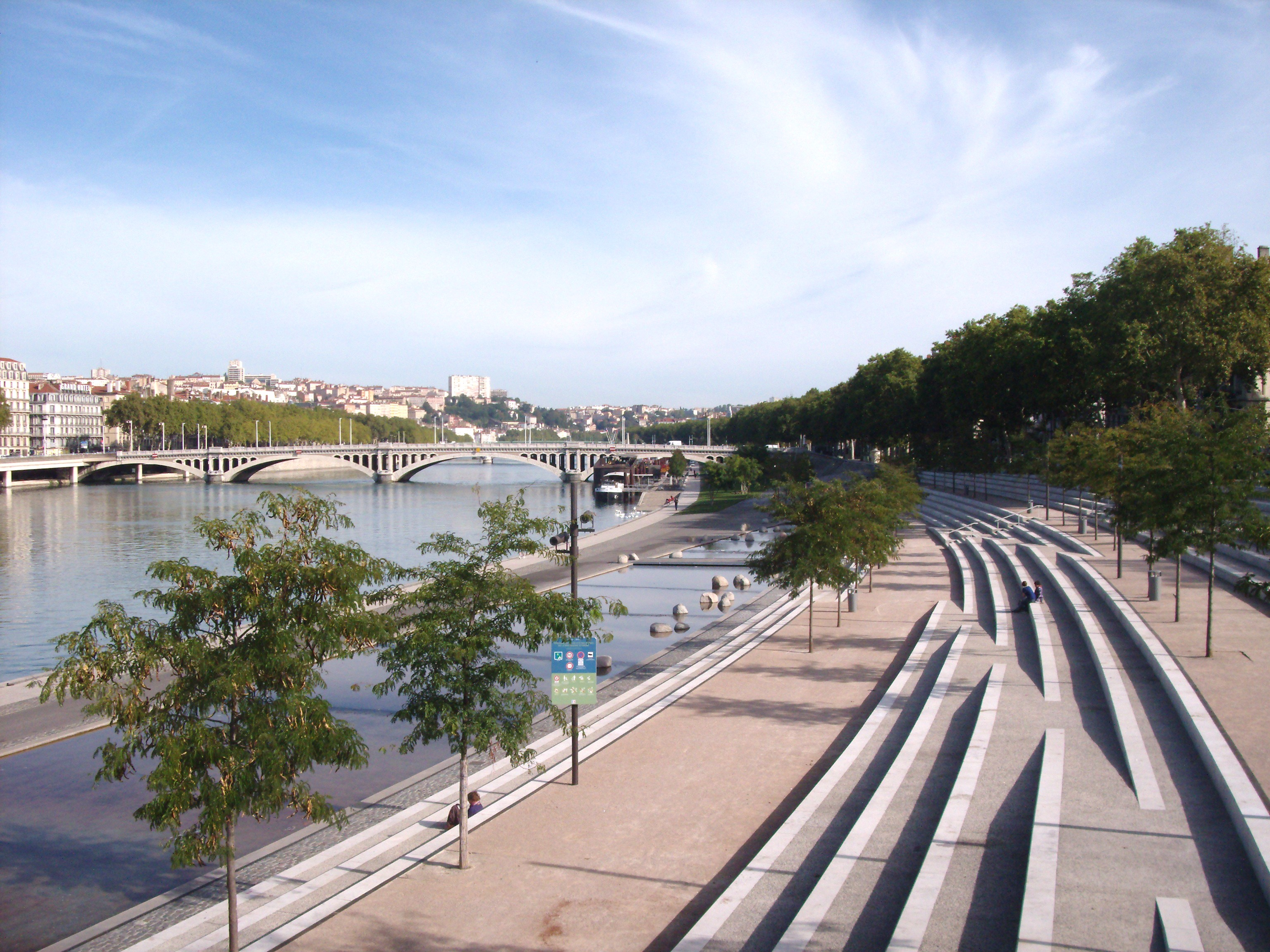 Berge du Rhône au niveau du pont de la Guillotière, en regardant le nord et la Croix-Rousse